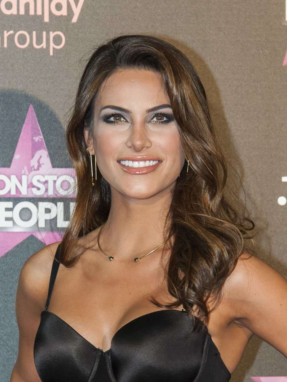 Fotos del photocall y fiesta de lanzamiento de un nuevo canal de televisión en España.